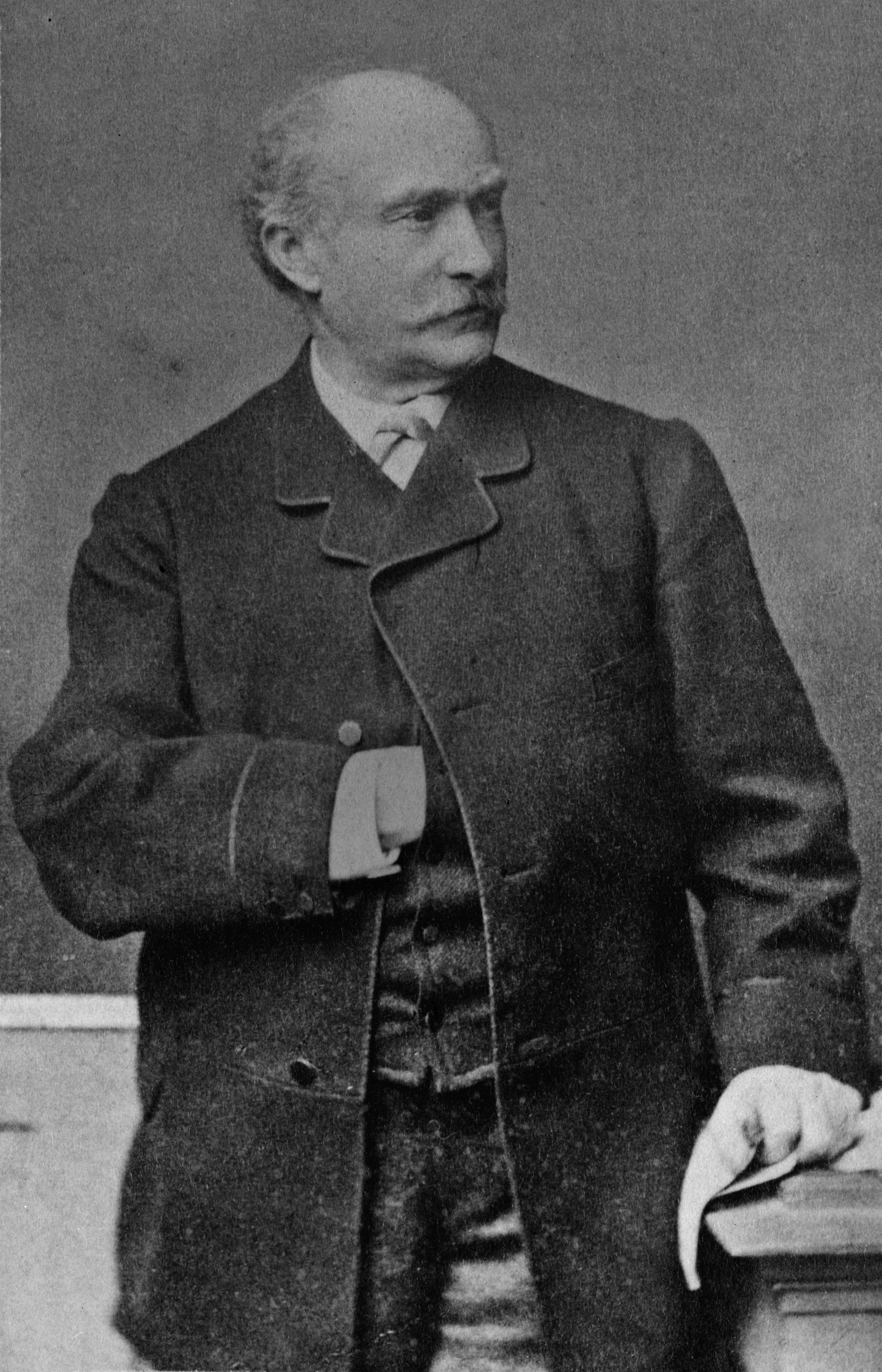 German author Friedrich Wilhelm Hackländer.